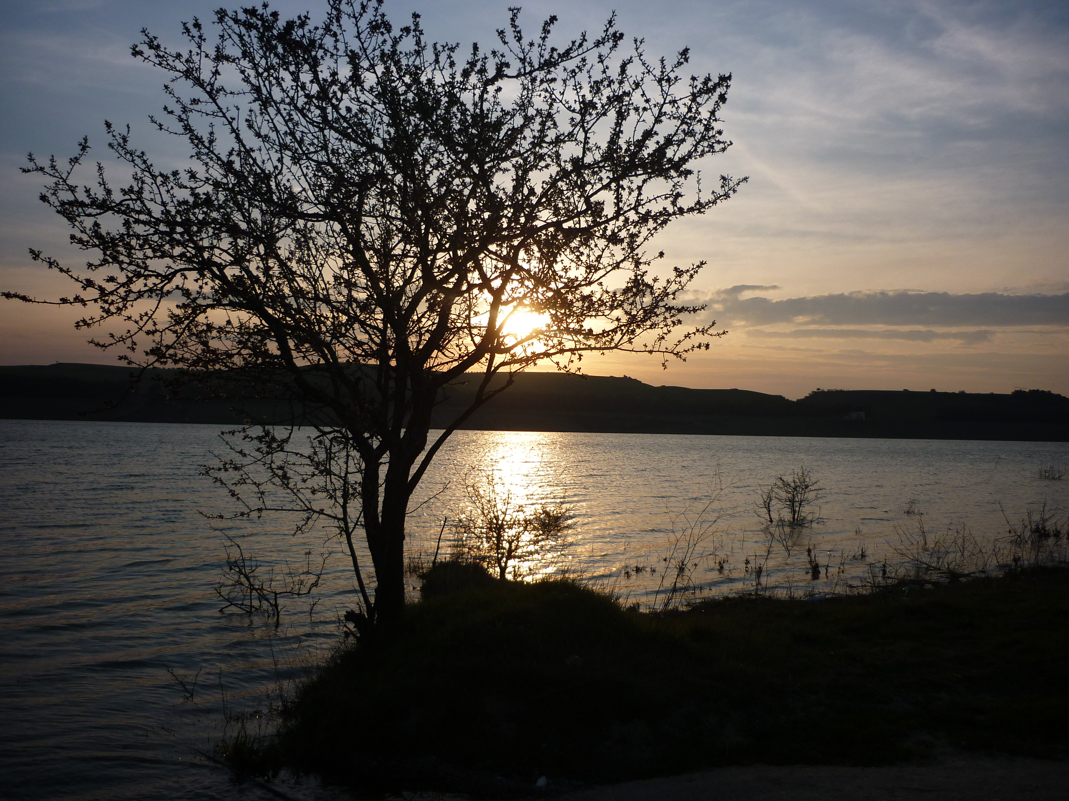 Diga Locone, Minervino Murge, BT